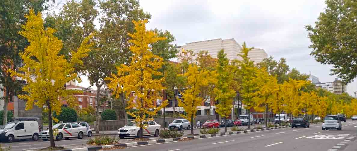 Hilera de árboles de la especie Gingko Biloba en la calle Príncipe de Vergara de Madrid, frente al Auditorio Nacional de Música. La foto se tomó el 12 de noviembre, y los árboles presentan una coloración intensamente dorada, propia de esta especie.